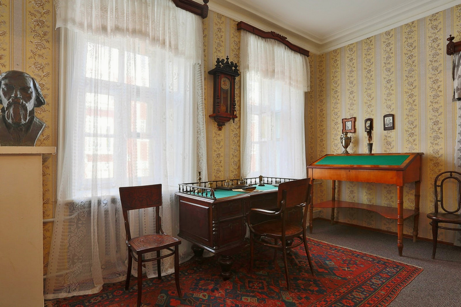 Casa di Černyševskij ad Astrachan'